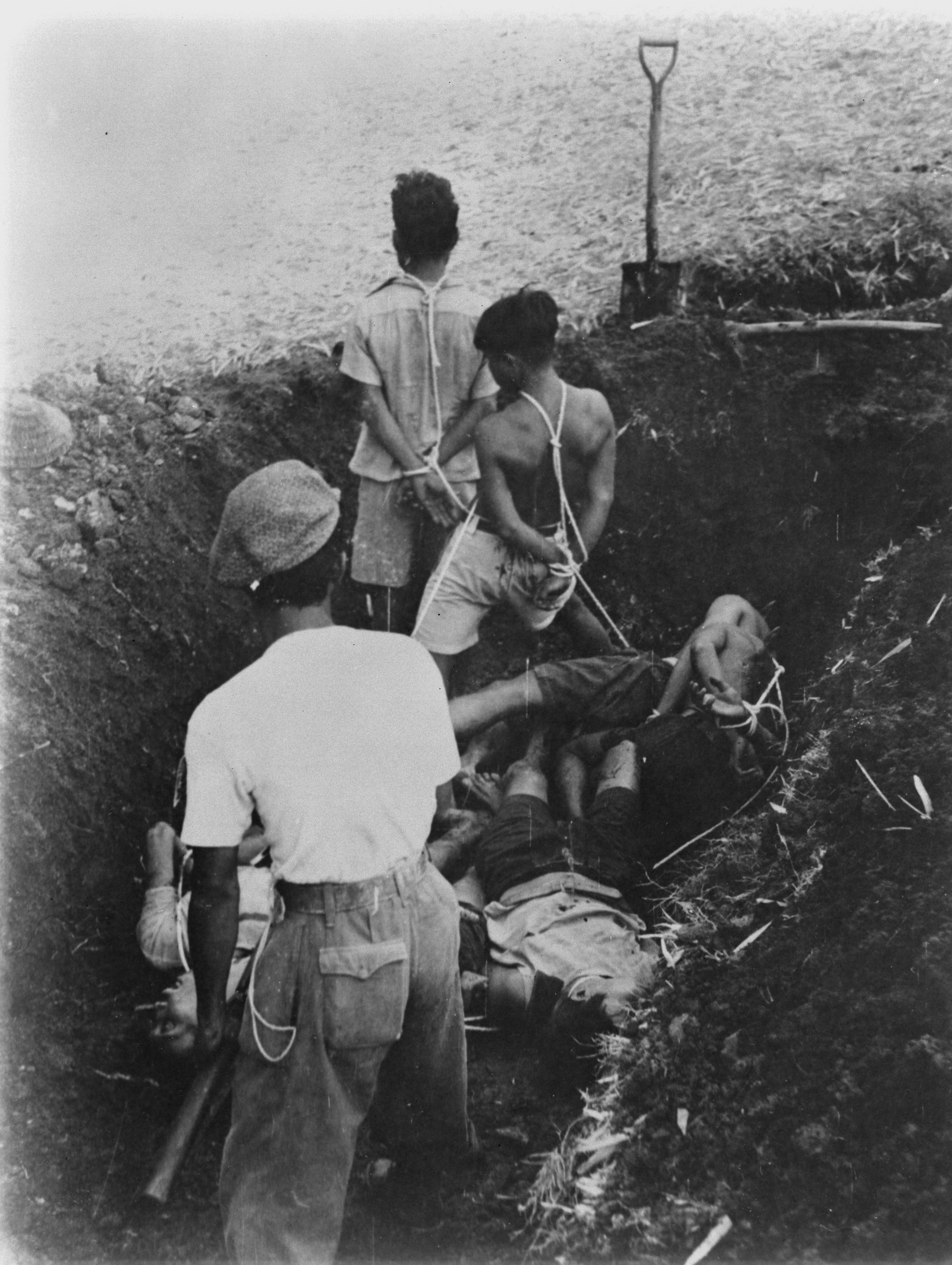 Collectie / Archief : Fotocollectie Dienst voor Legercontacten Indonesië Reportage / Serie : [DLC] Foto's gedode communisten door de TNI [gemaakt te Madioen, september 1948] Beschrijving : Groep mannen, met touwen geboeid staan in een greppel. Enkele van hen zijn neergevallen. Achter hen een man, de beul, in licht hemd die een geweer draagt Datum : september 1948 Locatie : Indonesië, Madiun, Nederlands-Indië Fotograaf : Fotograaf Onbekend / DLC Auteursrechthebbende : Nationaal Archief Materiaalsoort : Negatief (zwart/wit) Nummer archiefinventaris : bekijk toegang 2.24.04.02 Bestanddeelnummer : 8808